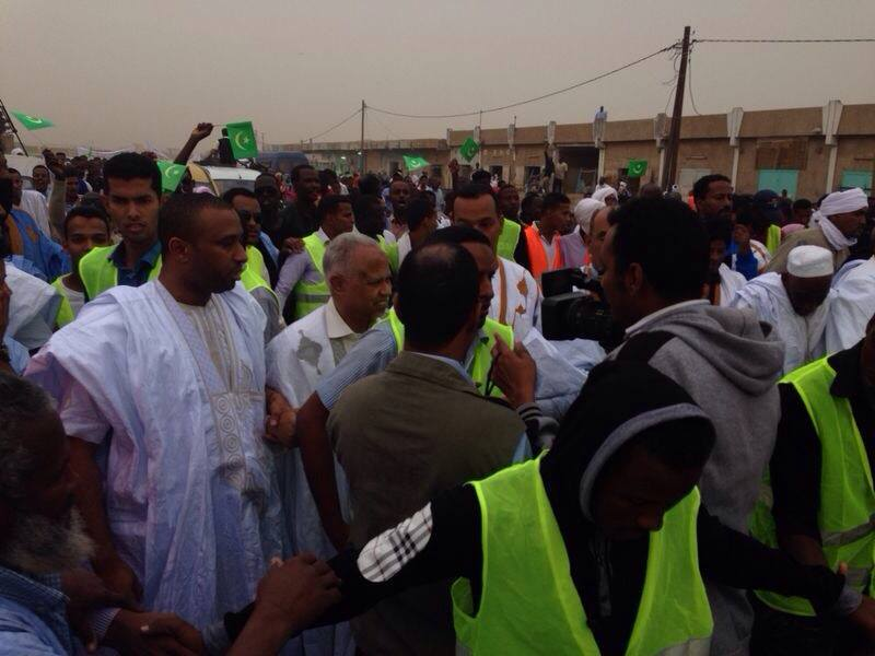 الرئيس السابق الدكتور الشيخ المختار مع الرئيس الحالي يوسف ولد حرمة في إحدى مسيرات المعارضة الموريتانية